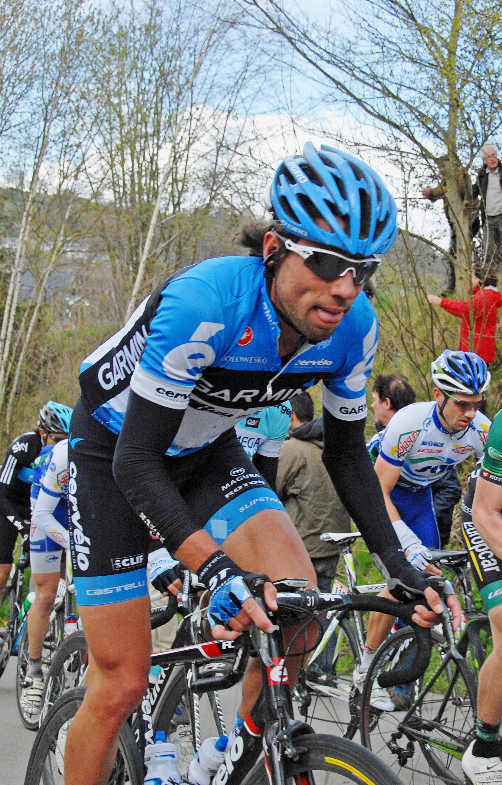 Côte de Stockeu in Luik-Bastenaken-Luik 2012